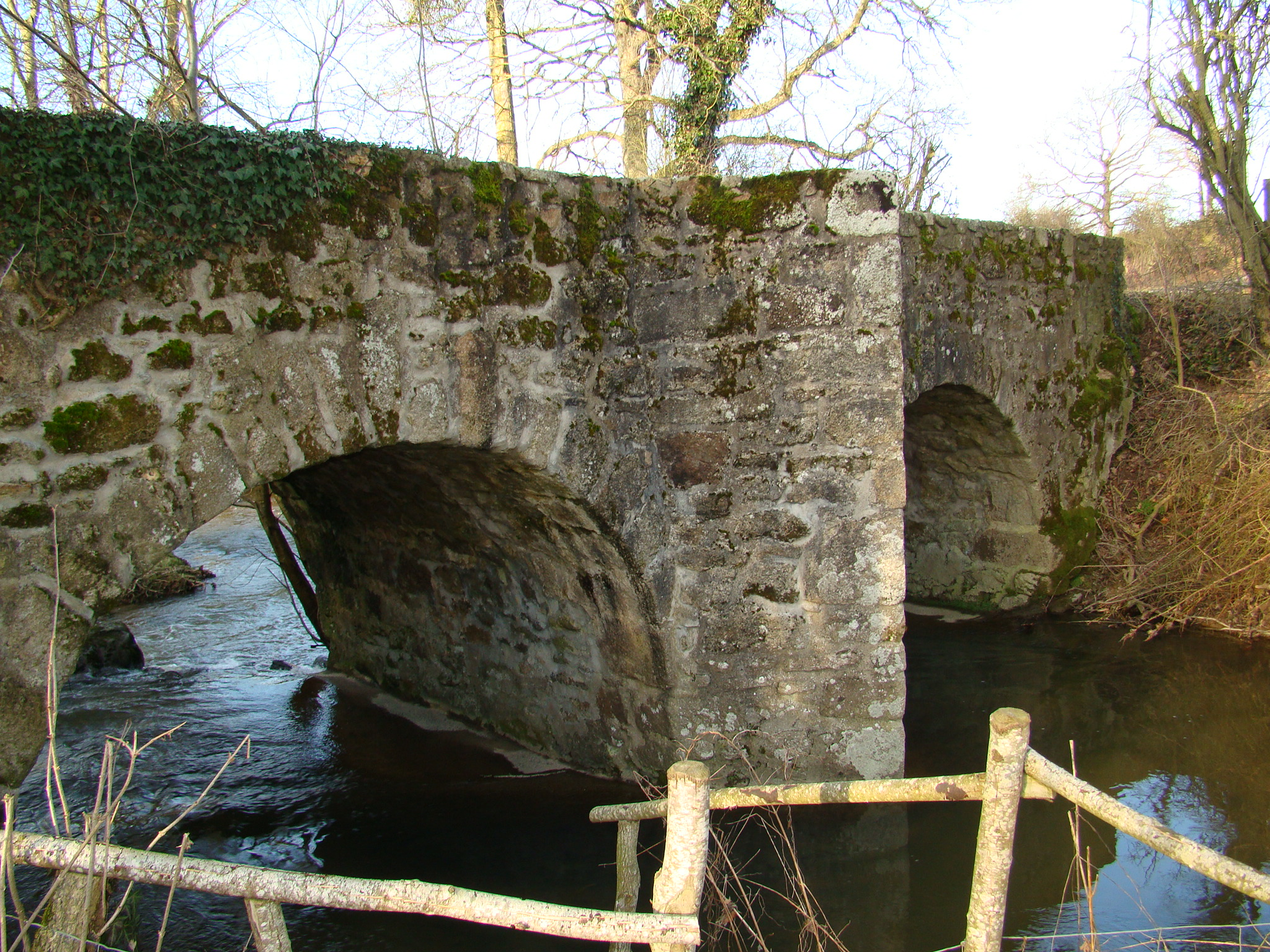 Le pont gallo-romain du Petit Cruhé à Noirterre (Deux-Sèvres - France)